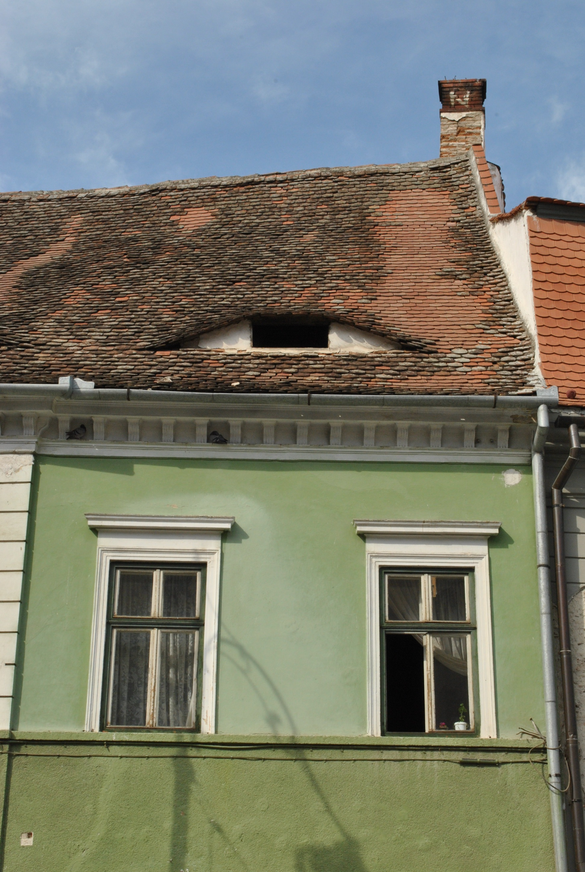 Casă, sf. sec. XVIII, înc. sec. XIX